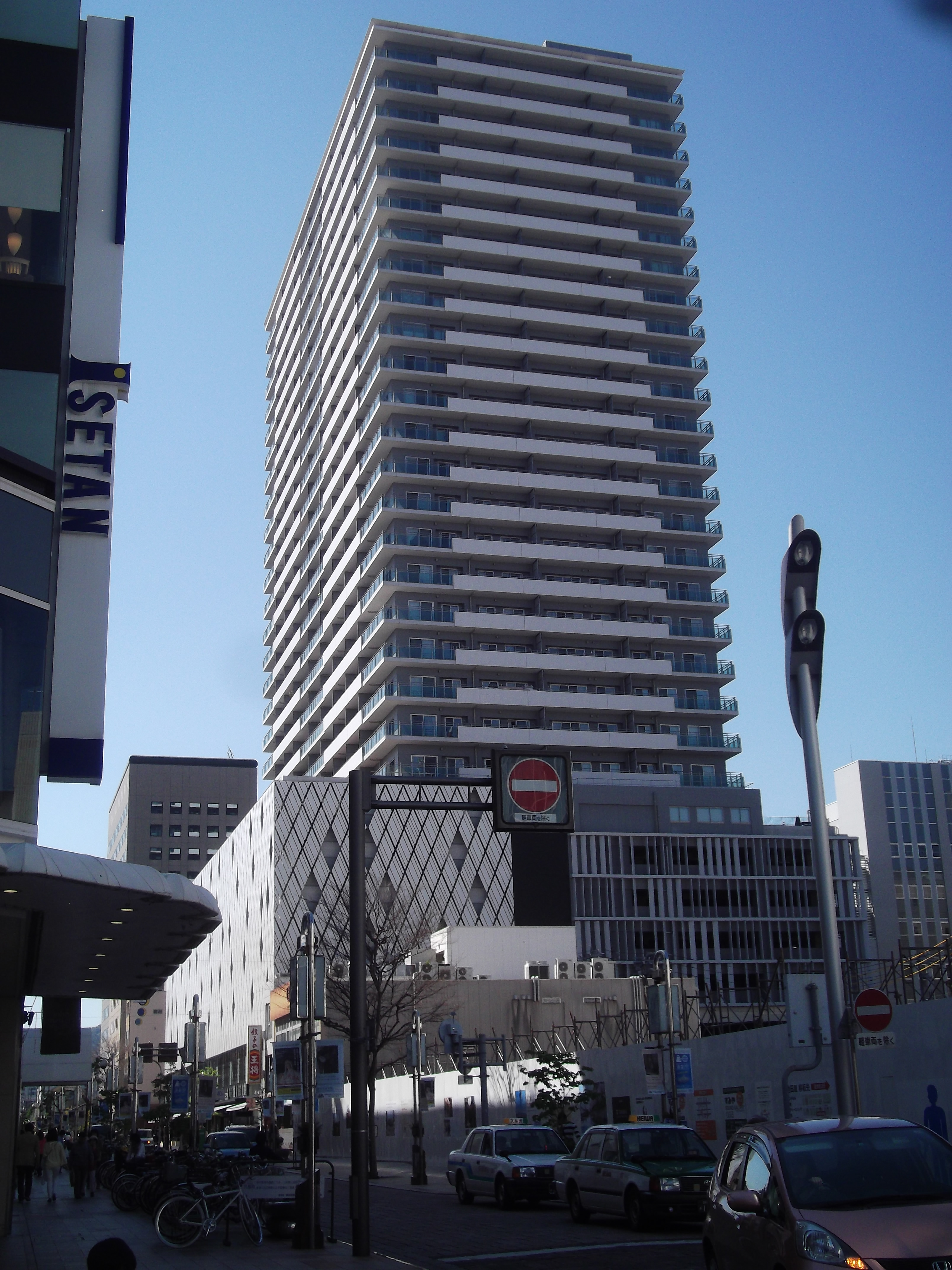 静岡市葵区の呉服町タワー。東南東より撮影。